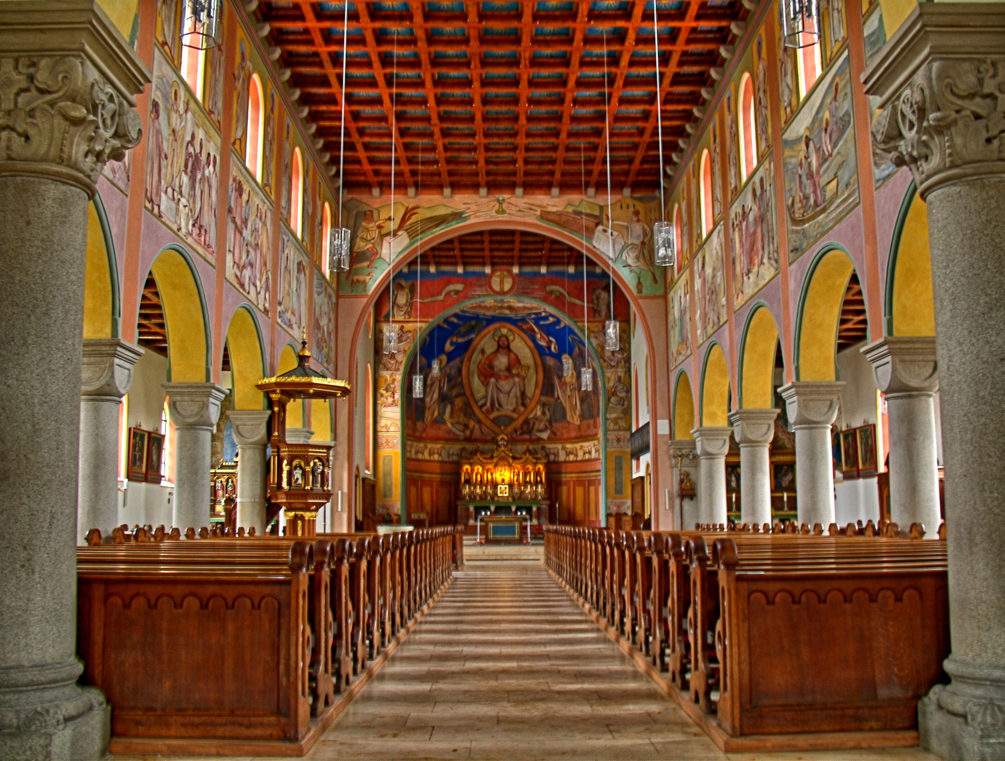 Germany, Bavaria, Olching katholische Kirche St. Peter und Paul, Innenraum